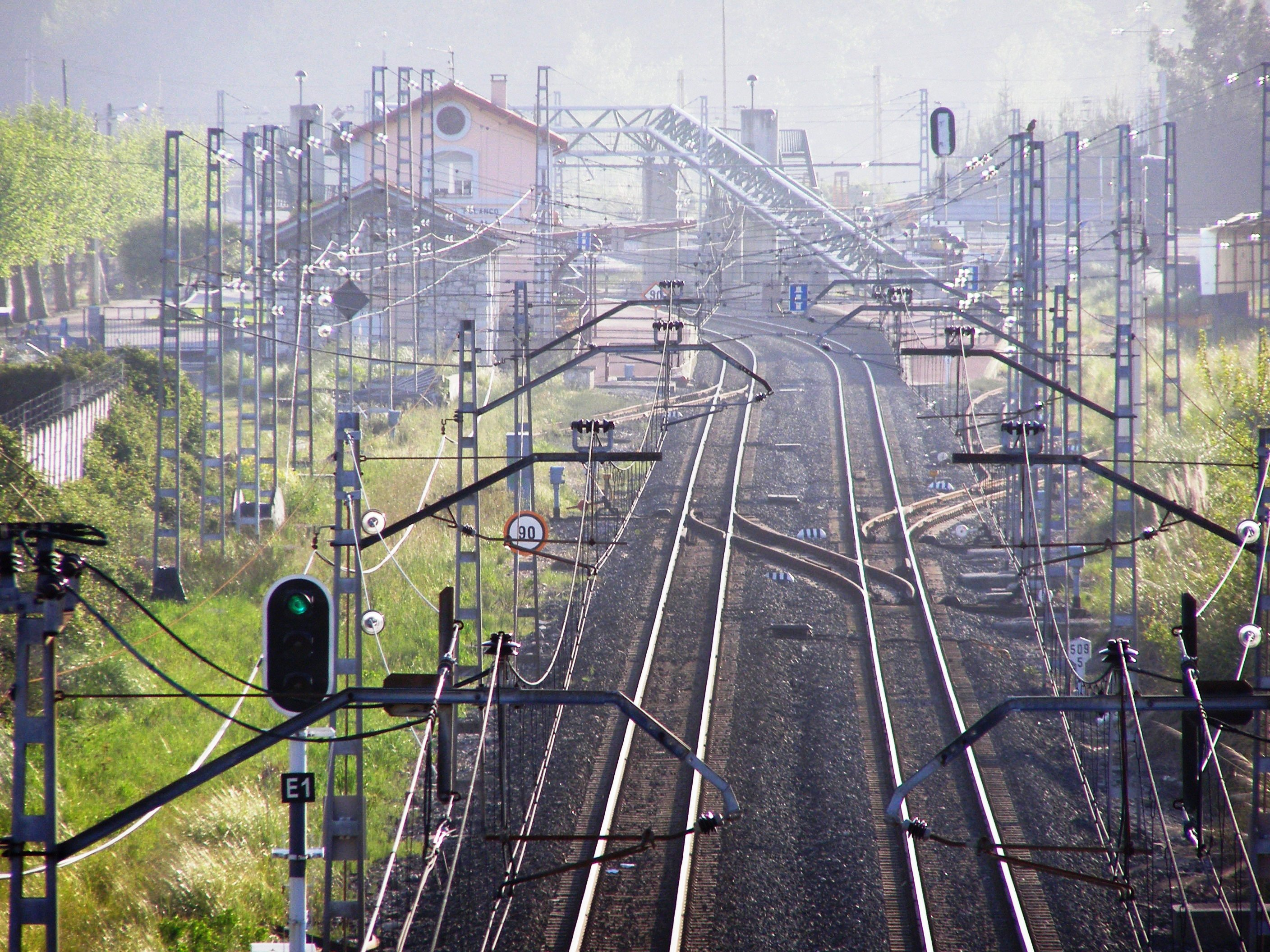 Trazado ferroviario de FEVE a la altura de Requejada (vista en dirección a Torrelavega)